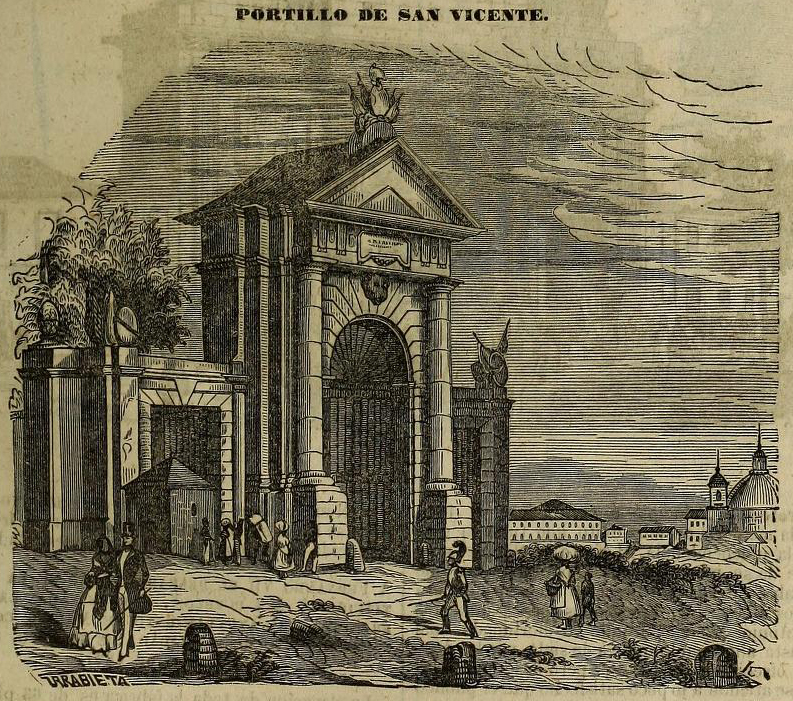 Portillo de San Vicente hacia mediados del siglo XIX, Madrid, España.